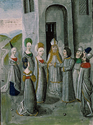 Mariage de Baudouin IV de Hainaut et d'Alix de Namur